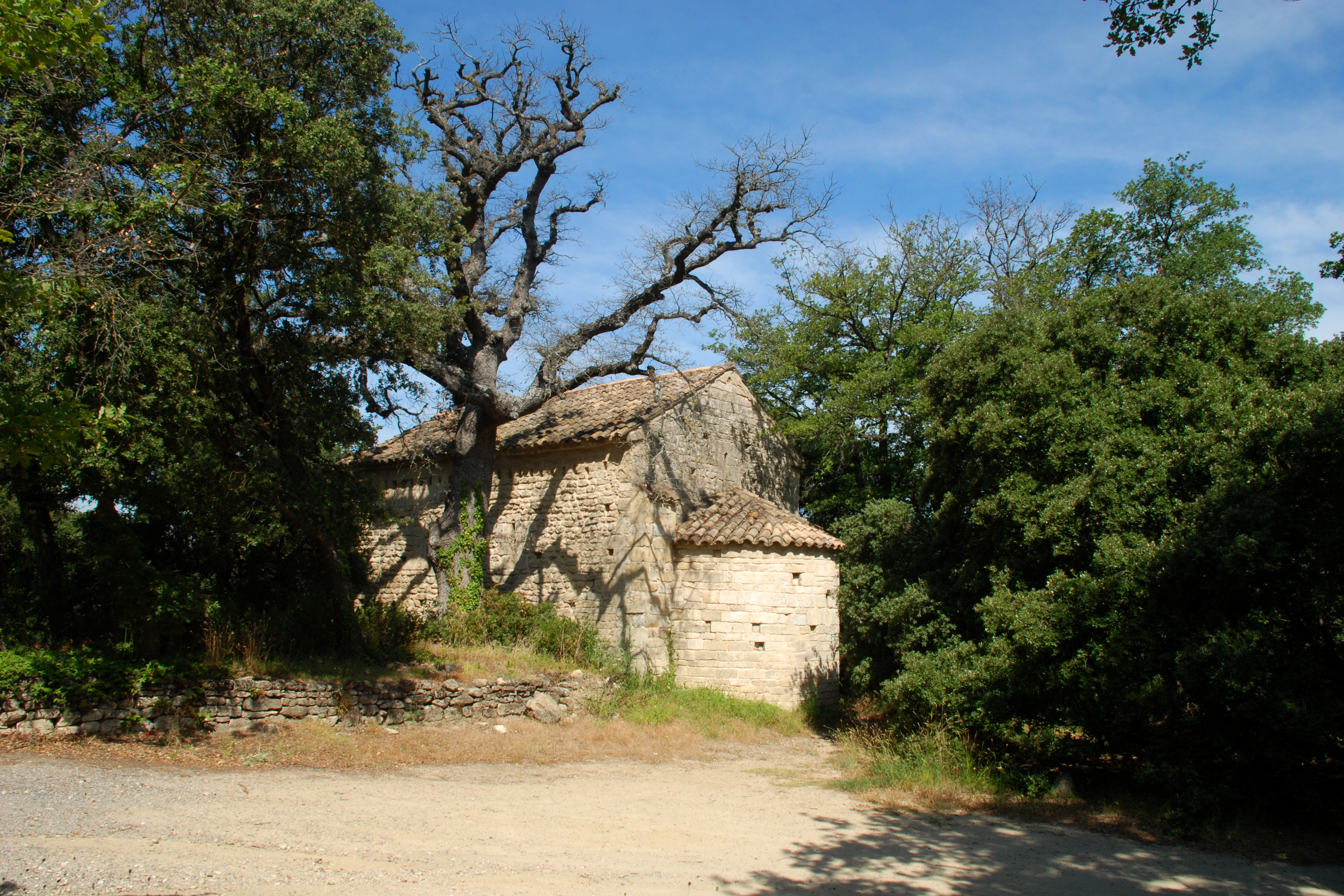 France - Provence - Bouches-du-Rhône - Aurons - Chapelle Saint-Martin-du-Sonnailler